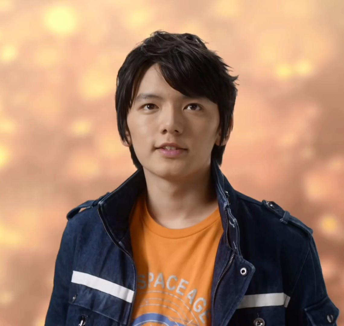 【ウルトラマンジード】金のウルトラカプセルキャンペーン!! 6s 濱田龍臣